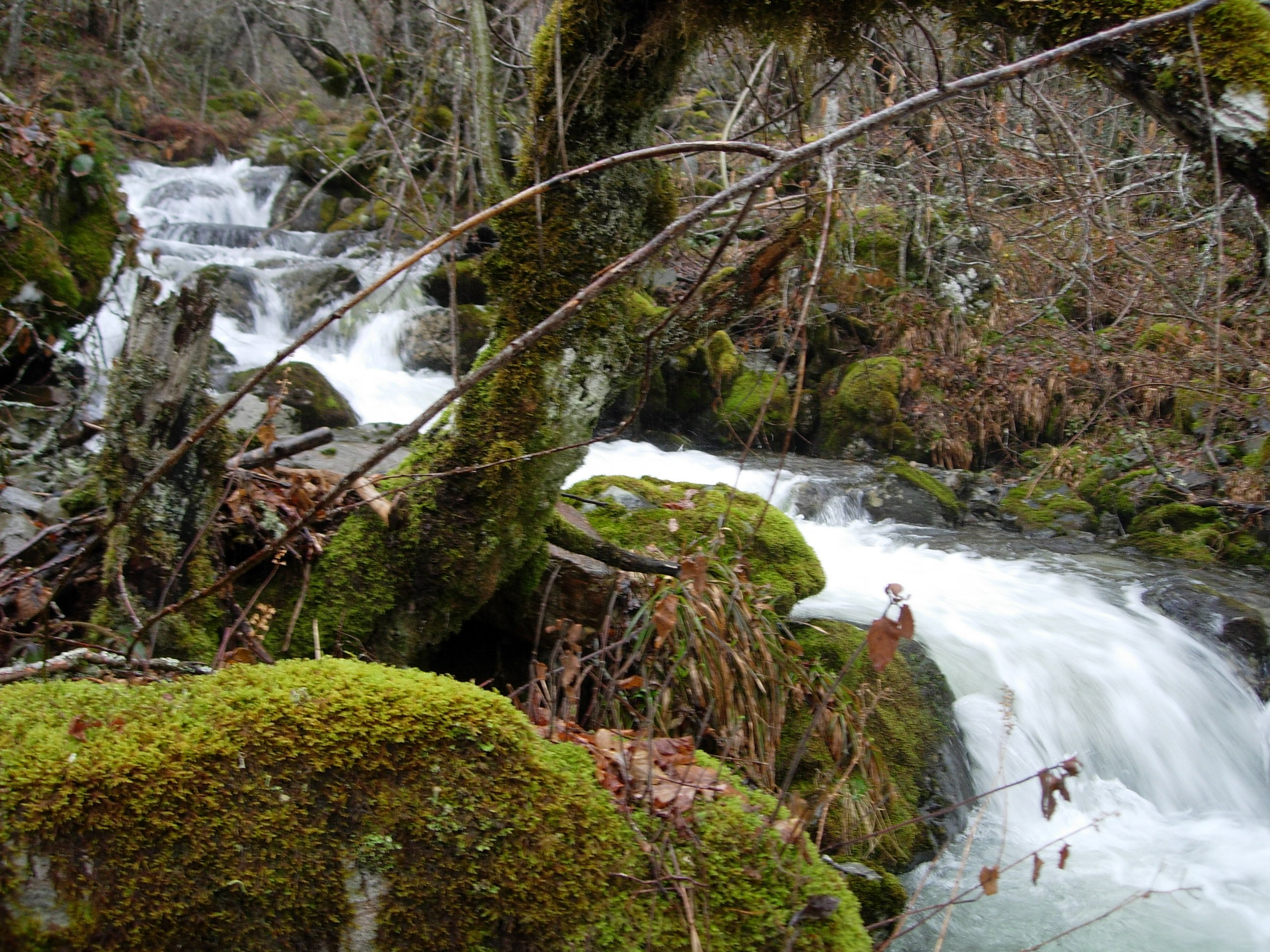 Río Burbia, en la provincia de León (España)